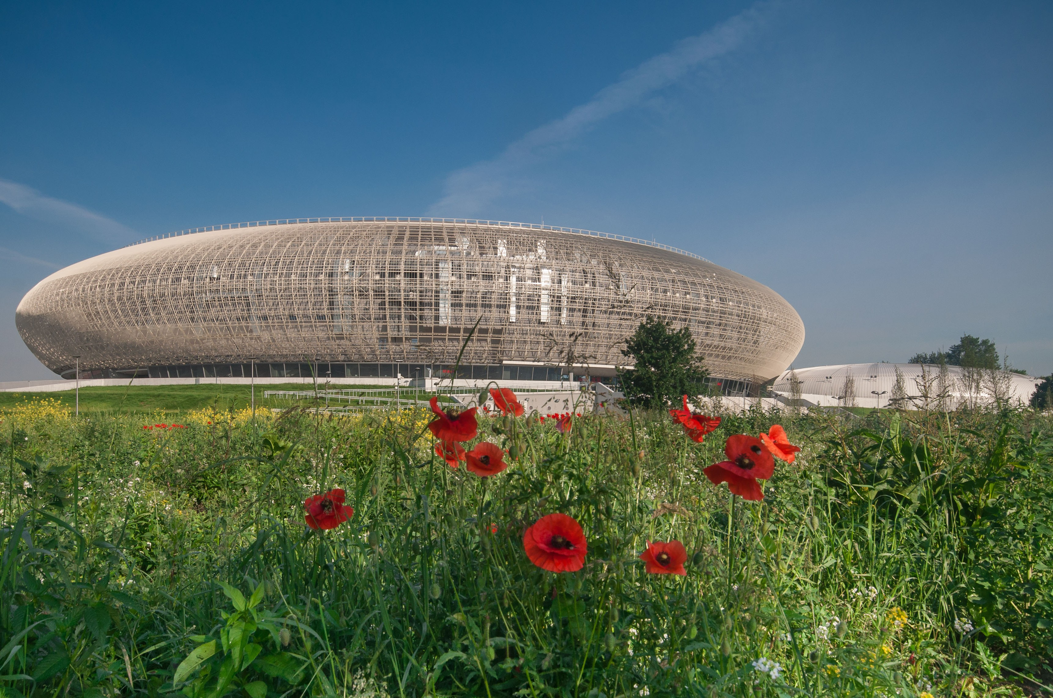 Kraków Arena – wielofunkcyjna hala widowiskowo-sportowa w Krakowie w dzielnicy Czyżyny, przy nowo powstałej ulicy Stanisława Lema.